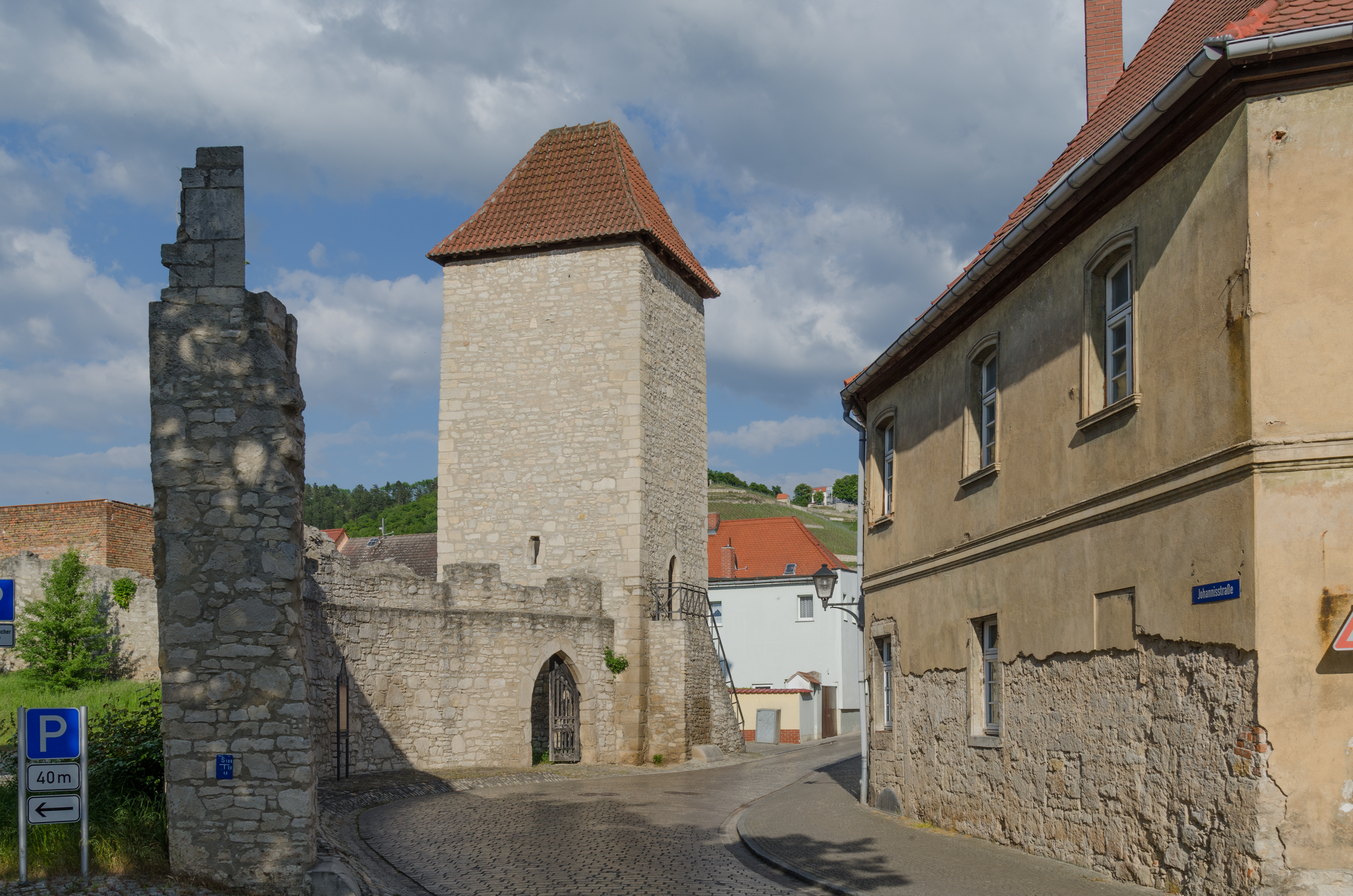 Freyburg an der Unstrut, Stadtmauer, Eckstädter Tor